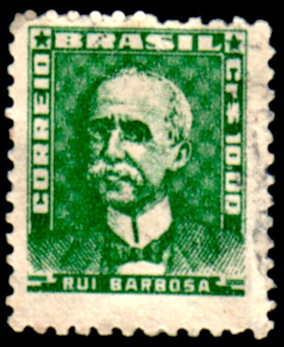 Estampilla de Brasil 1964: Efigie de Rui Barbarsa